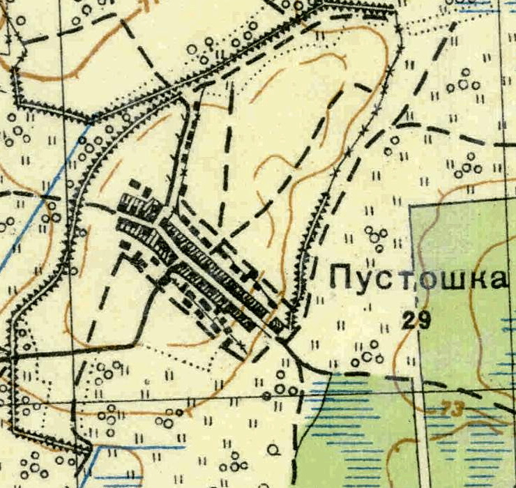 Топографическая карта Ленинградской области, квадрат О-36-13-А-г, деревня Пустошка